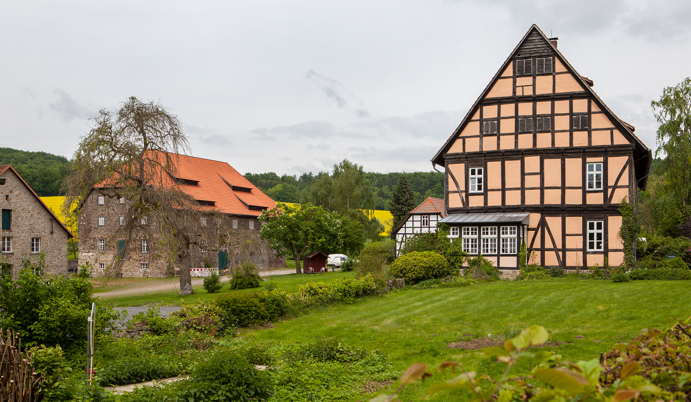 Domäne Oelentrup, Ansicht von Südwesten This is the photograph of an architectural monument. It is part of the list of cultural monuments of Dörentrup, no. 7